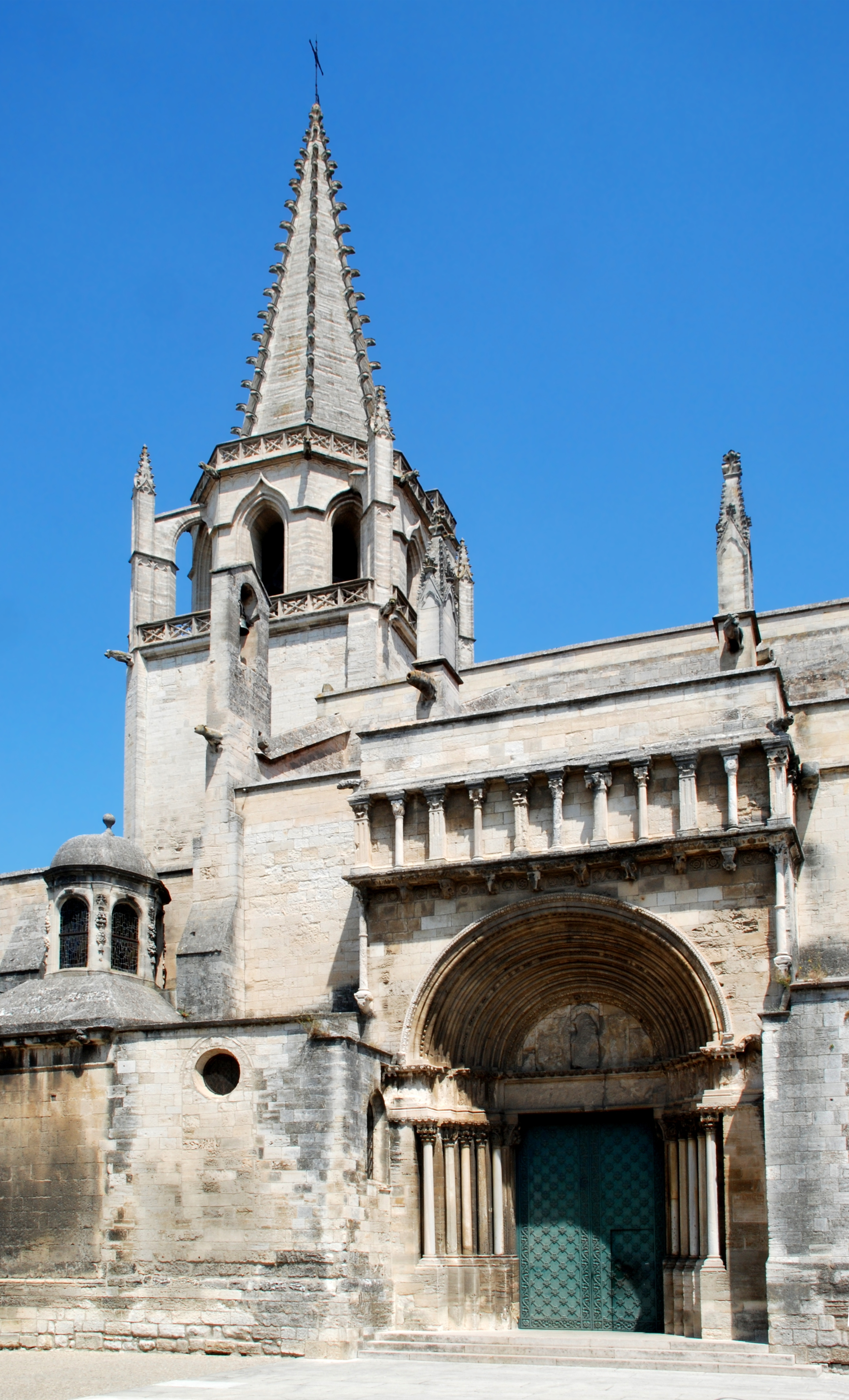 France - Provence - Tarascon - Église Sainte-Marthe de Tarascon